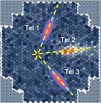 Triangolazione